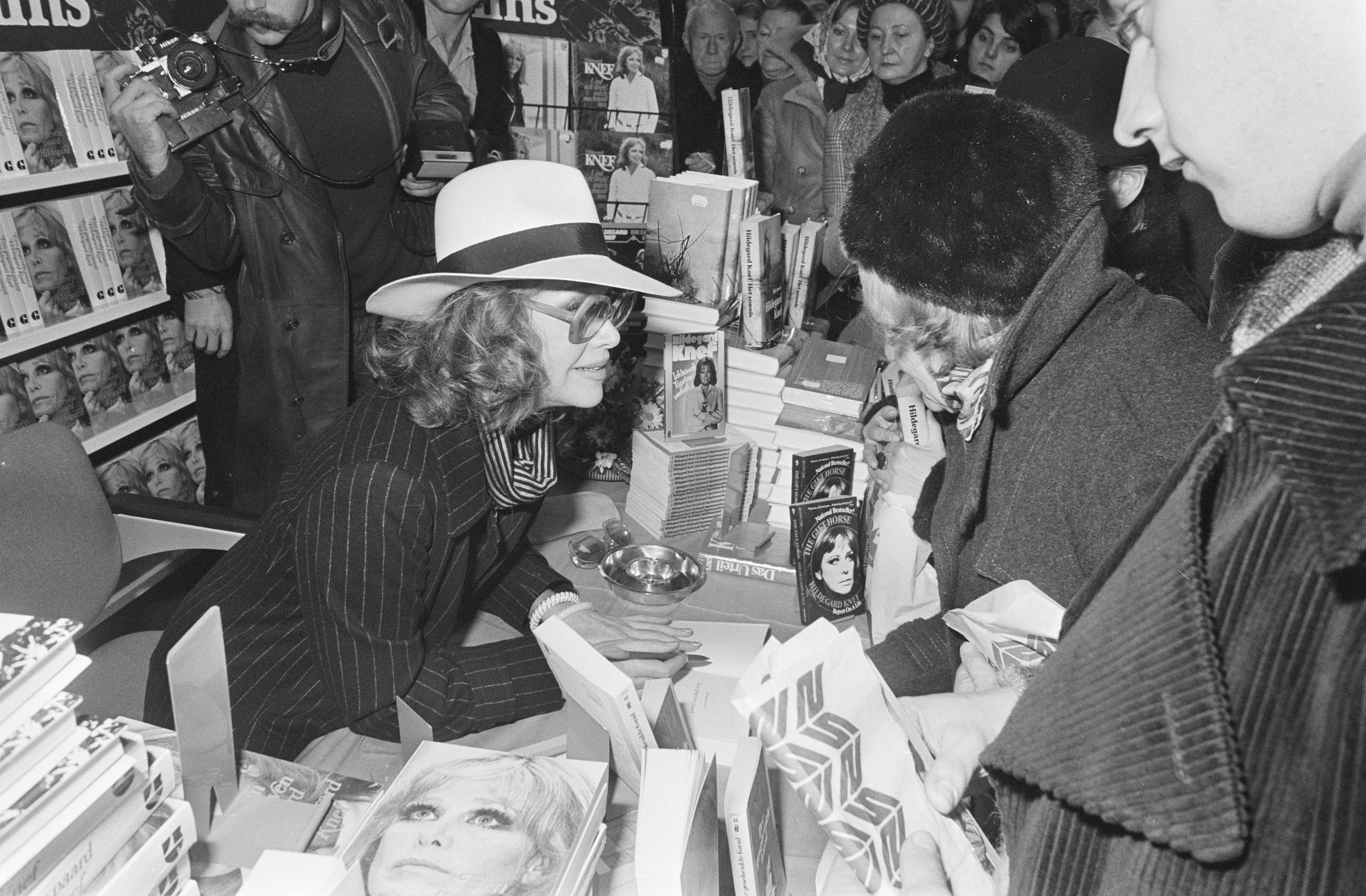 Hildegard Knef signeert boeken in Amsterdam